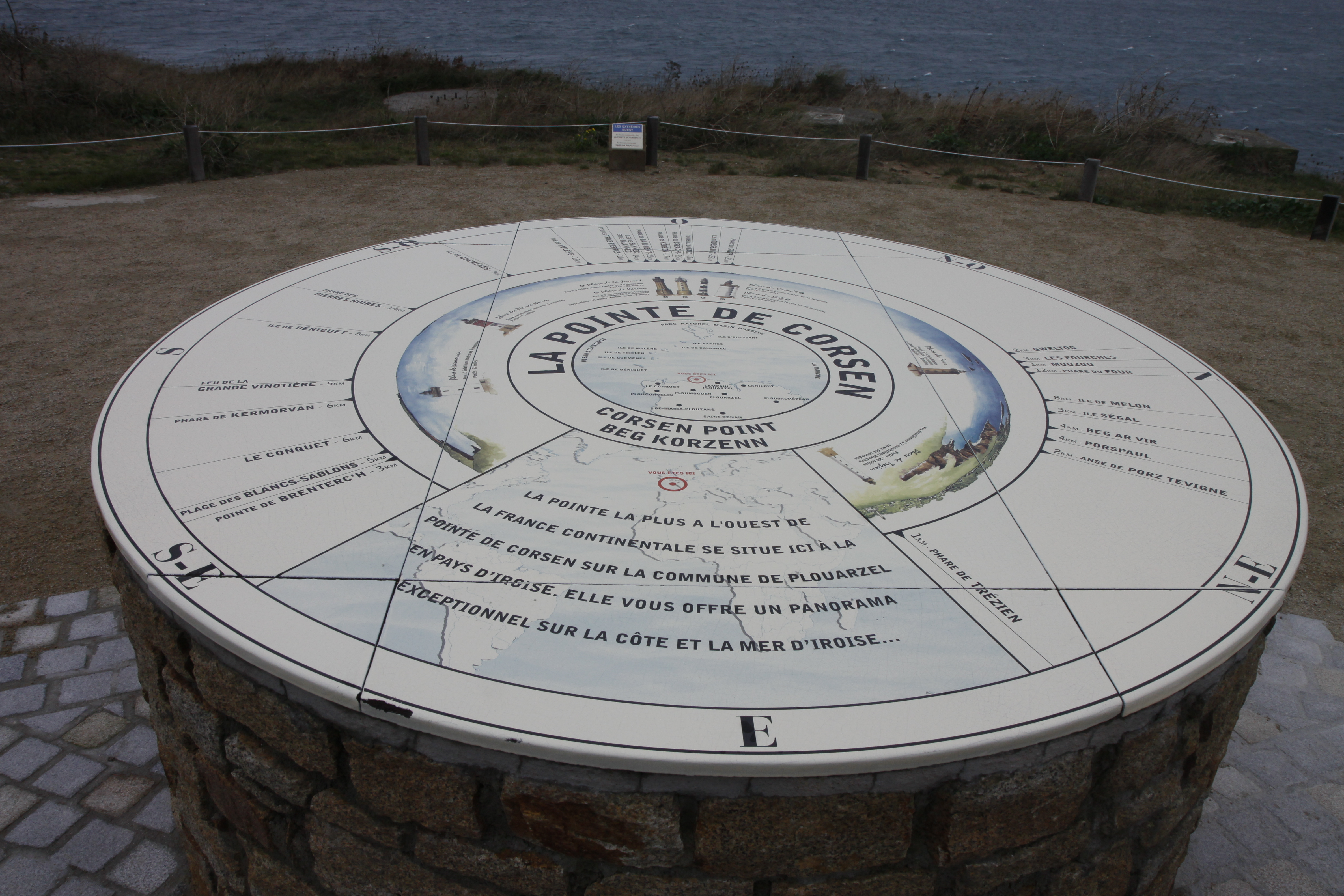 Pointe de Corsen (Finistère), die westlichste Stelle von Kontinentalfrankreich